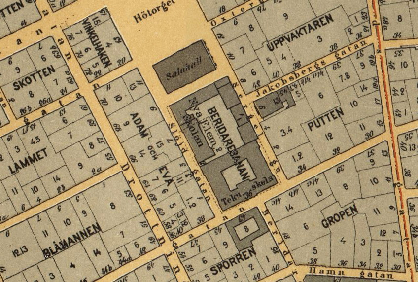 Del av Stockholmskartan visande Hötorget och kvarteret Beridarebanan